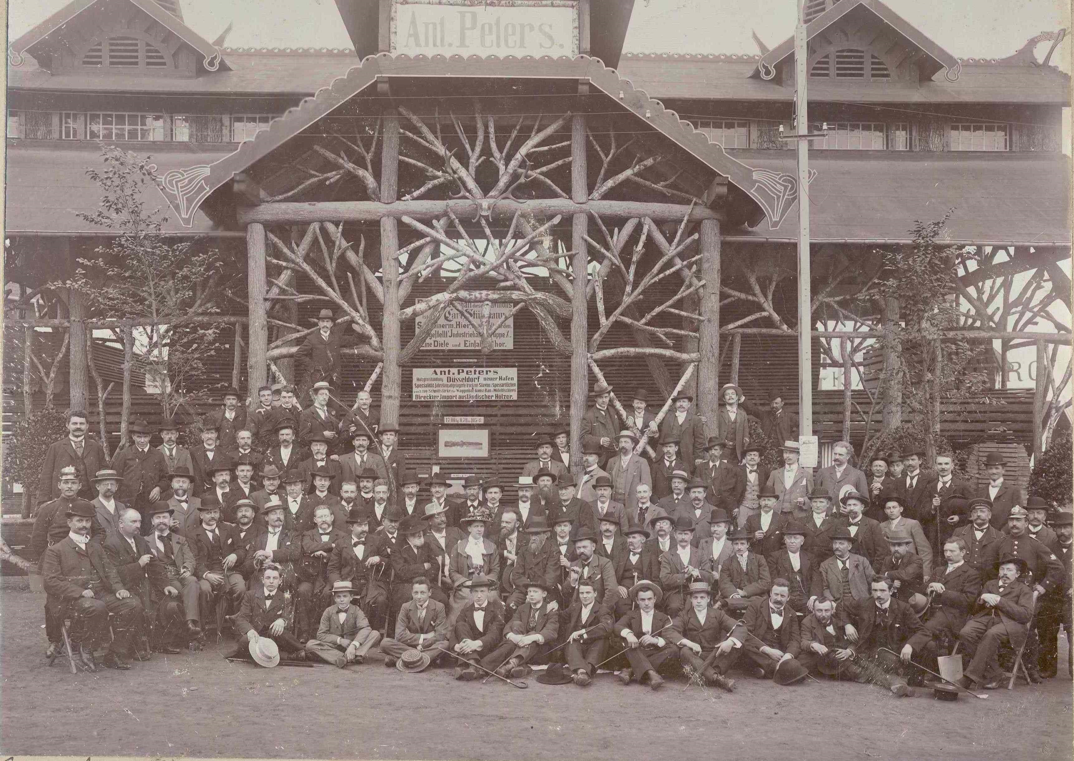 Pierre en Joseph Cuypers met gezamenlijk personeel van de Cuypers' Kunstwerkplaatsen bij een bezoek aan houthandel Ant. Peters in Düsseldorf. 1902. Foto. 22.3 × 29.2 cm (8.7 × 11.4 in). Roermond, Cuypershuis (0667).